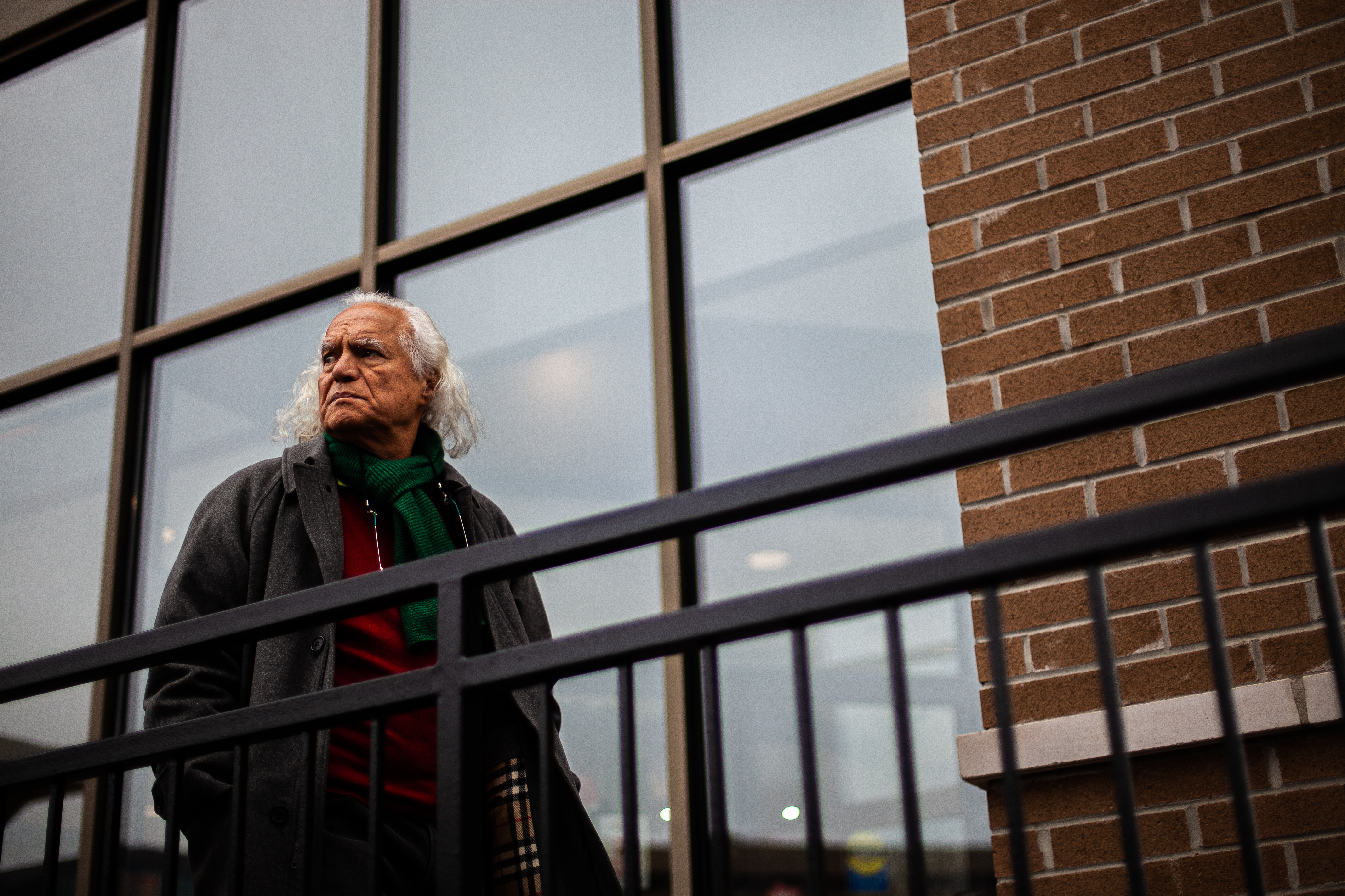 این عکس ها در شهر تورنتو توسط پوریا افخمی ثبت شده است.